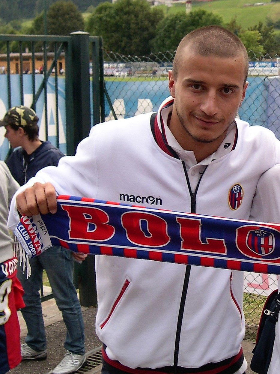 Casarini